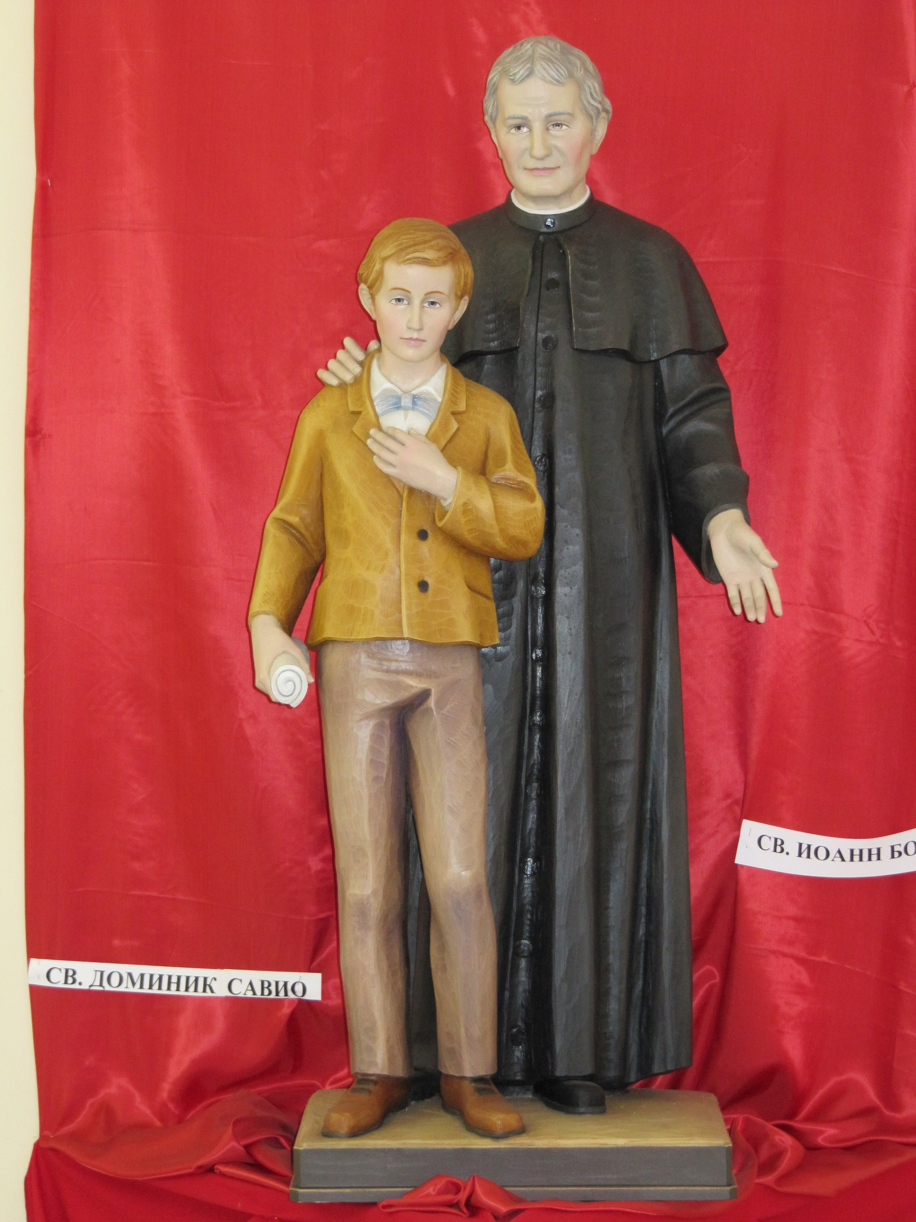 Святые Дон Боско и Доминик Савио